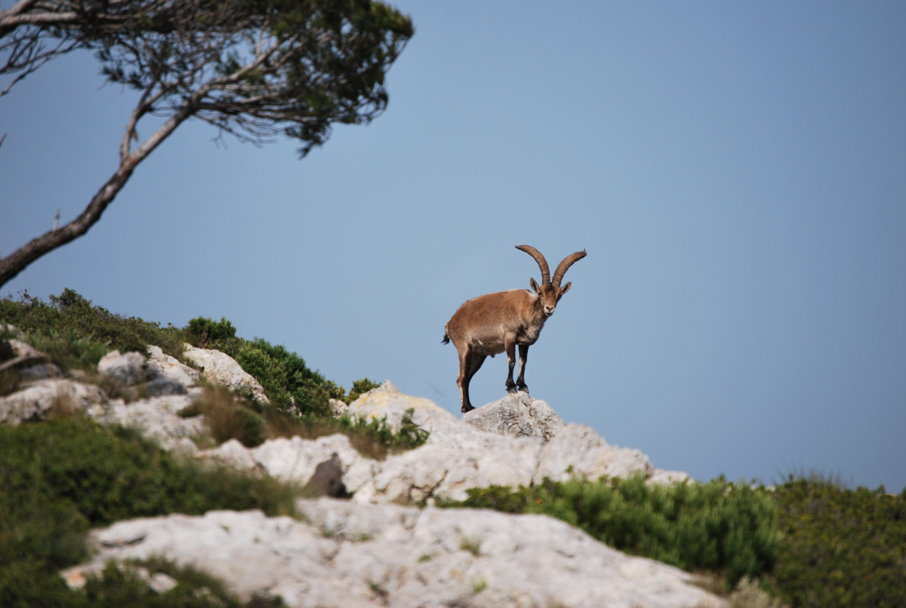 Parque Natural de Els Ports This is a a photo of a natural area in Catalonia, Spain, with id: ES510154